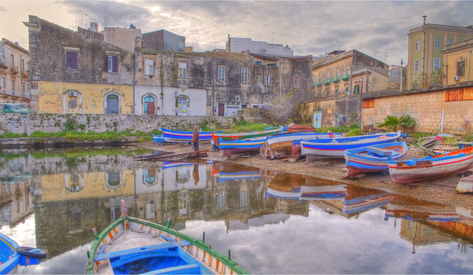 Versione senza cornice del file: Calafatari Siracusa.jpg